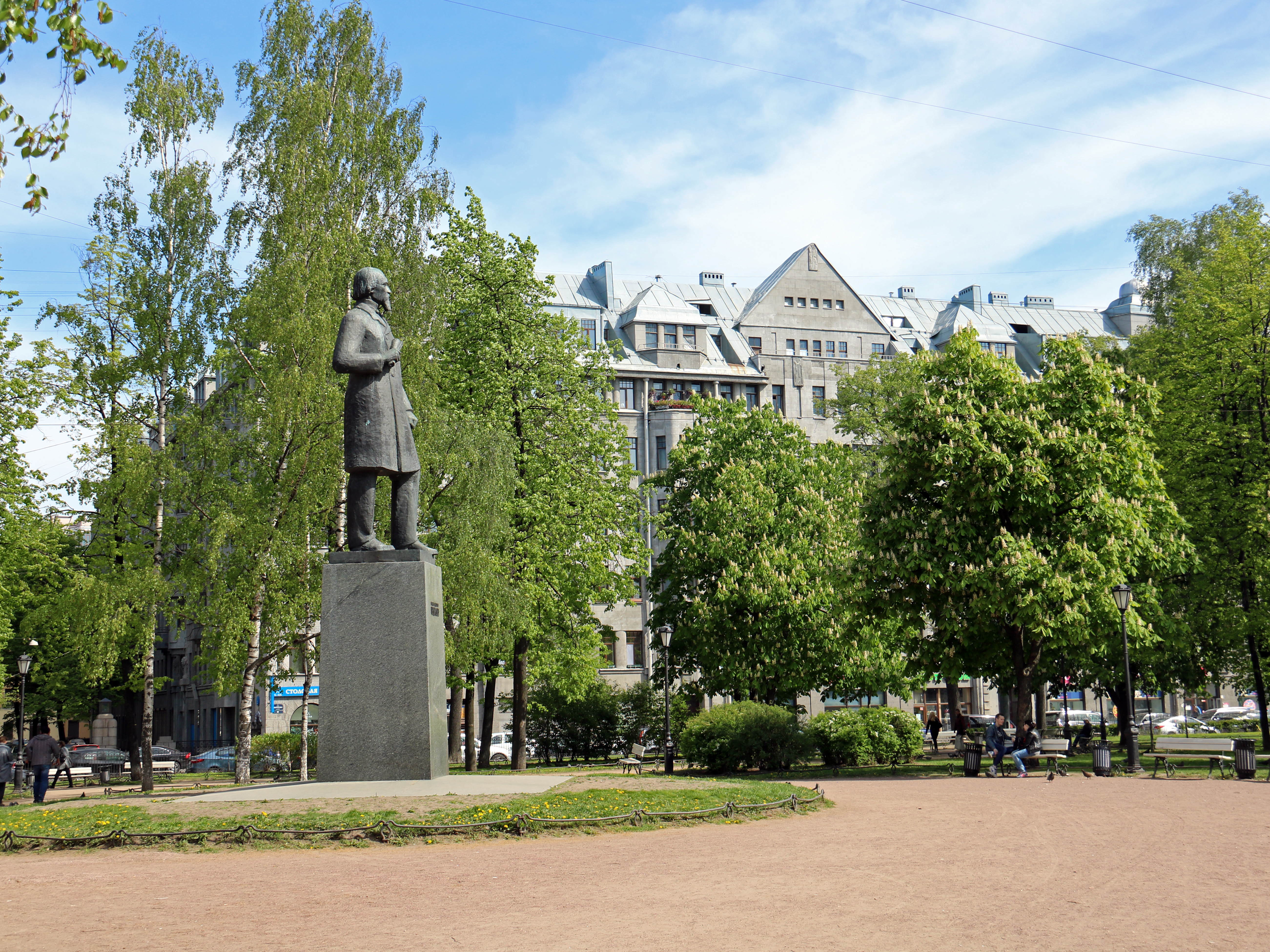 Греческий сад с территорией: Греческий проспект, 8, Прудковский переулок, 1-3, Центральный район, Санкт-Петербург